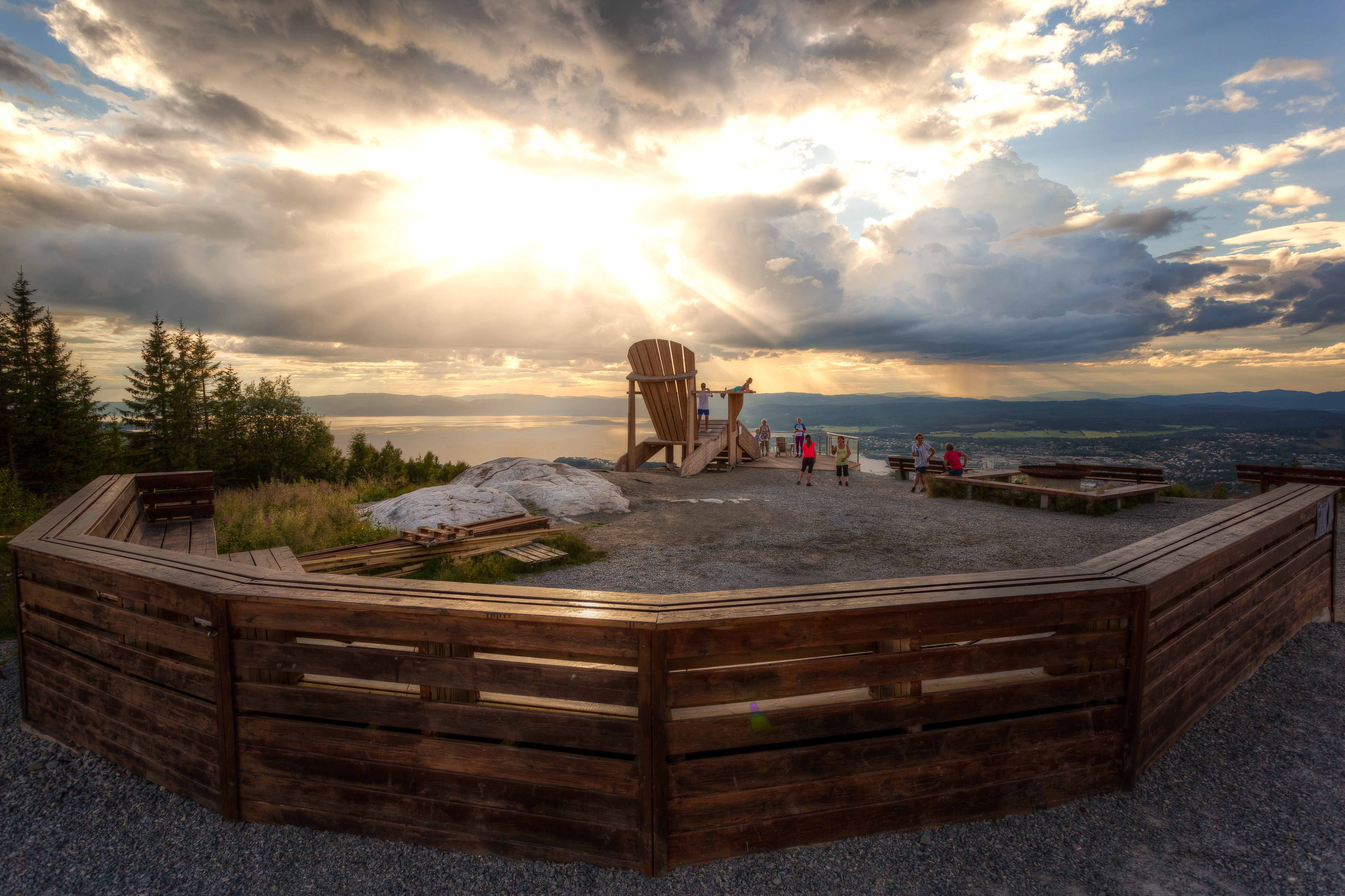 Verdens største hagestol på Oftenåsen i Steinkjer kommune.